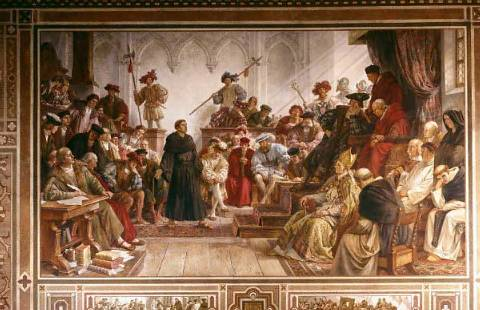 Hermann Wislicenus: Martin Luther auf dem Reichstag zu Worms (Wandbild im Kaisersaal Goslar)